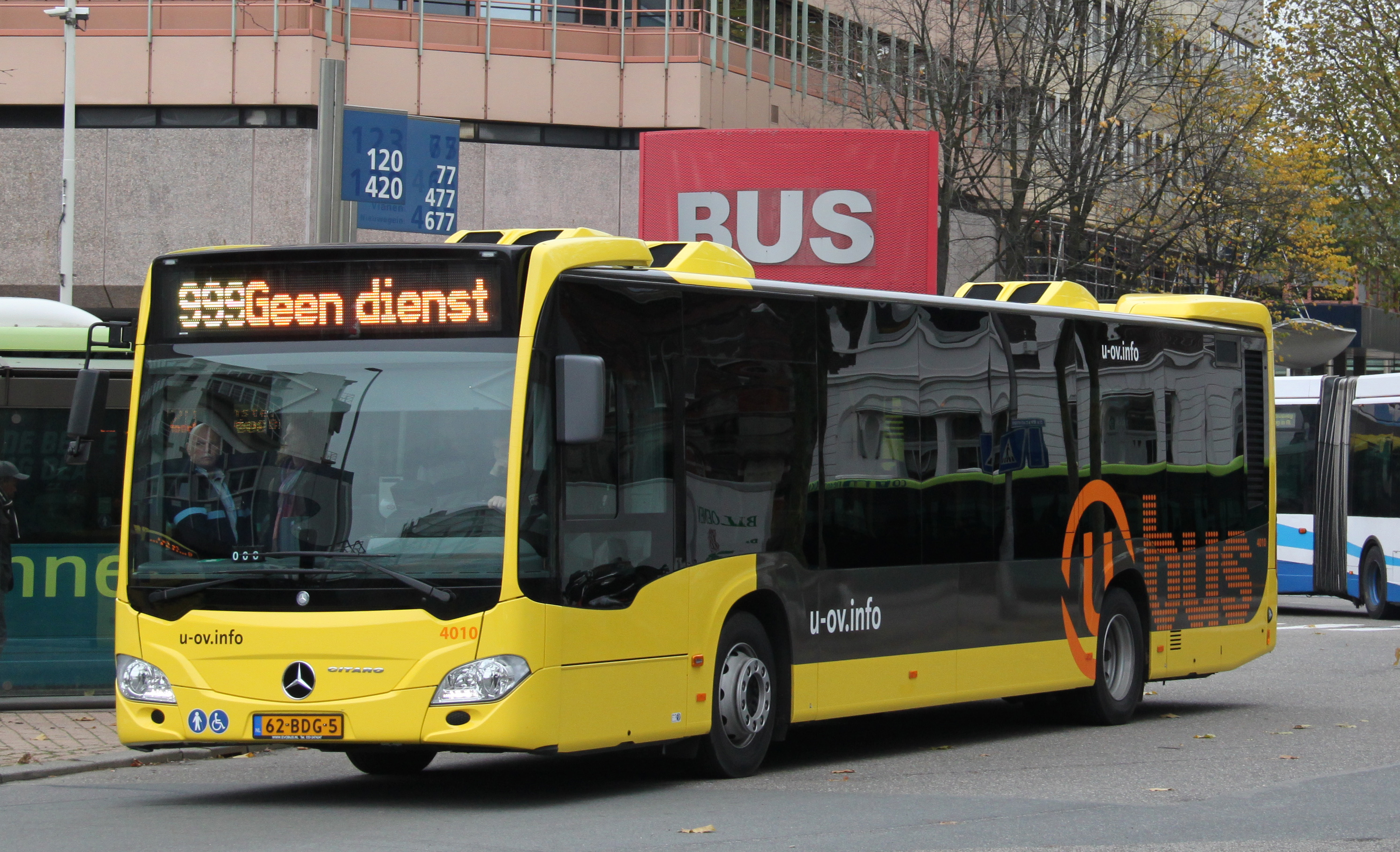 Een Citaro van Qbuzz rijdt instructieritten voor personeel enkele dagen voor het ingaan van de nieuwe concessie Utrecht.